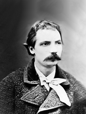 Ulisse Barbieri